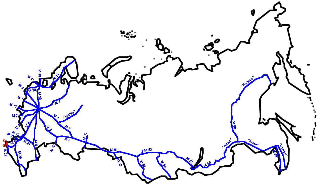 M25 im russischen Fernstraßennetz